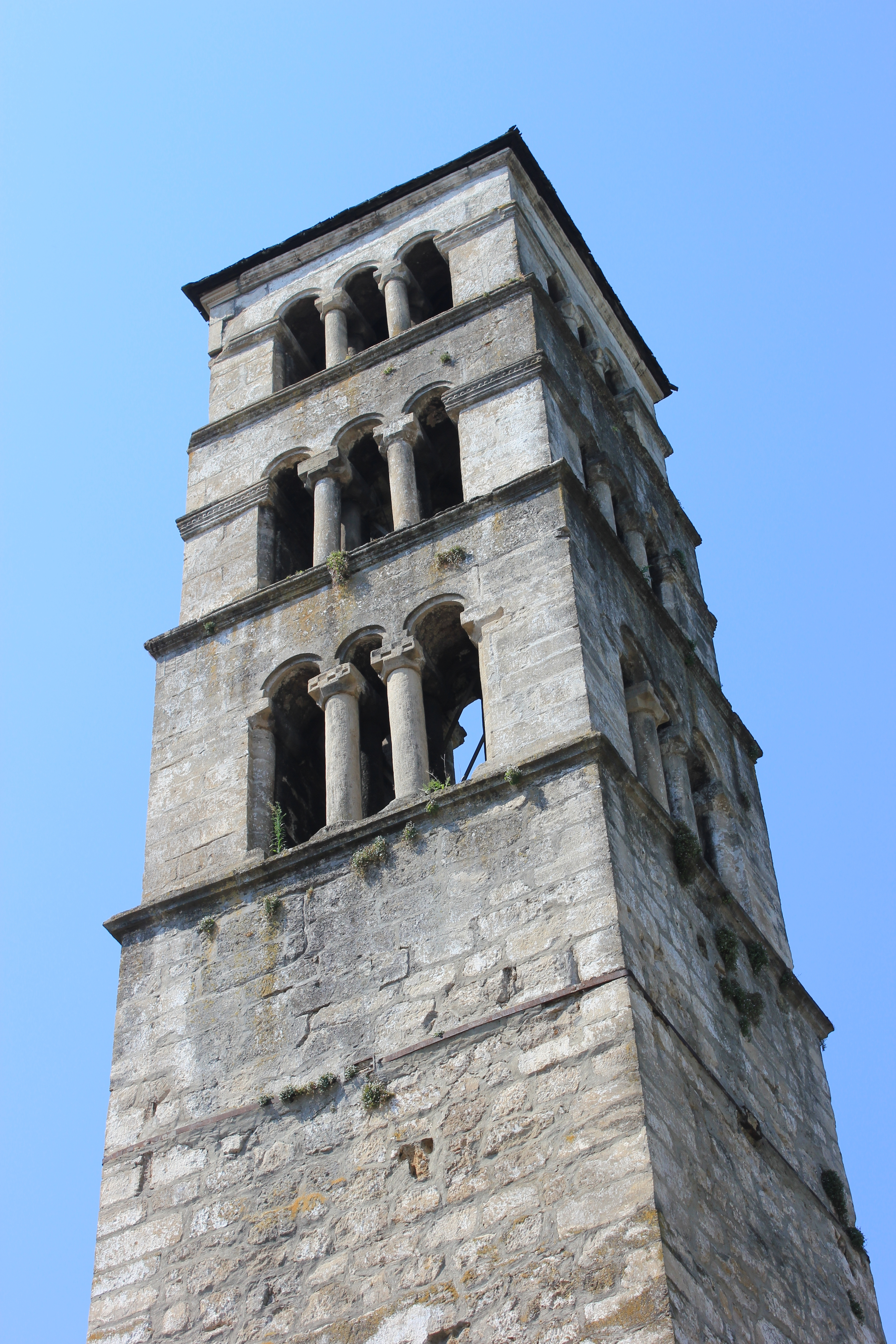 Glockenturm der Lukaskirche in Jajce